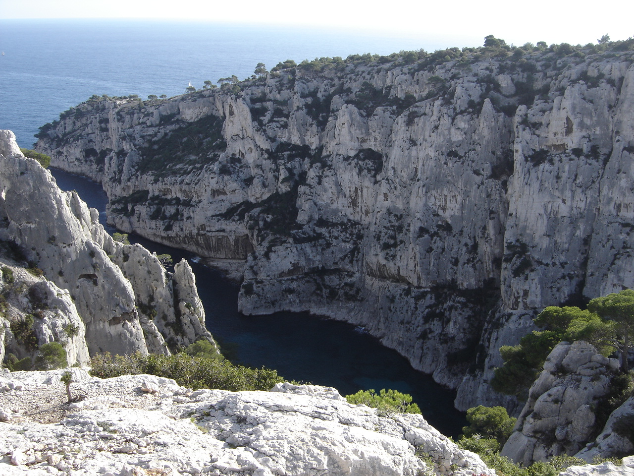 Calanque d'En-Vau